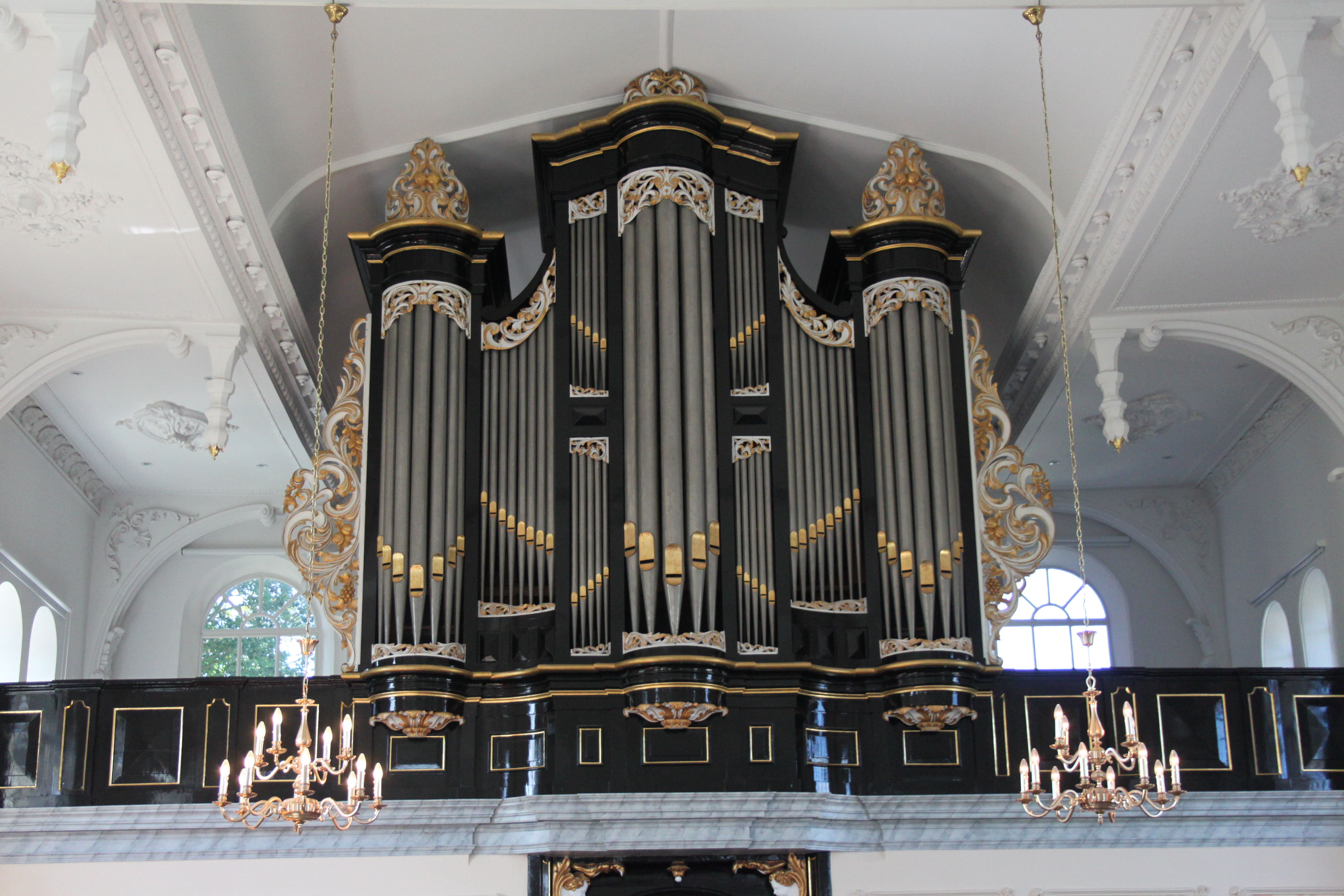 Baaium, Terp 21 - Ned. Hervormde Kerk - anno 1876